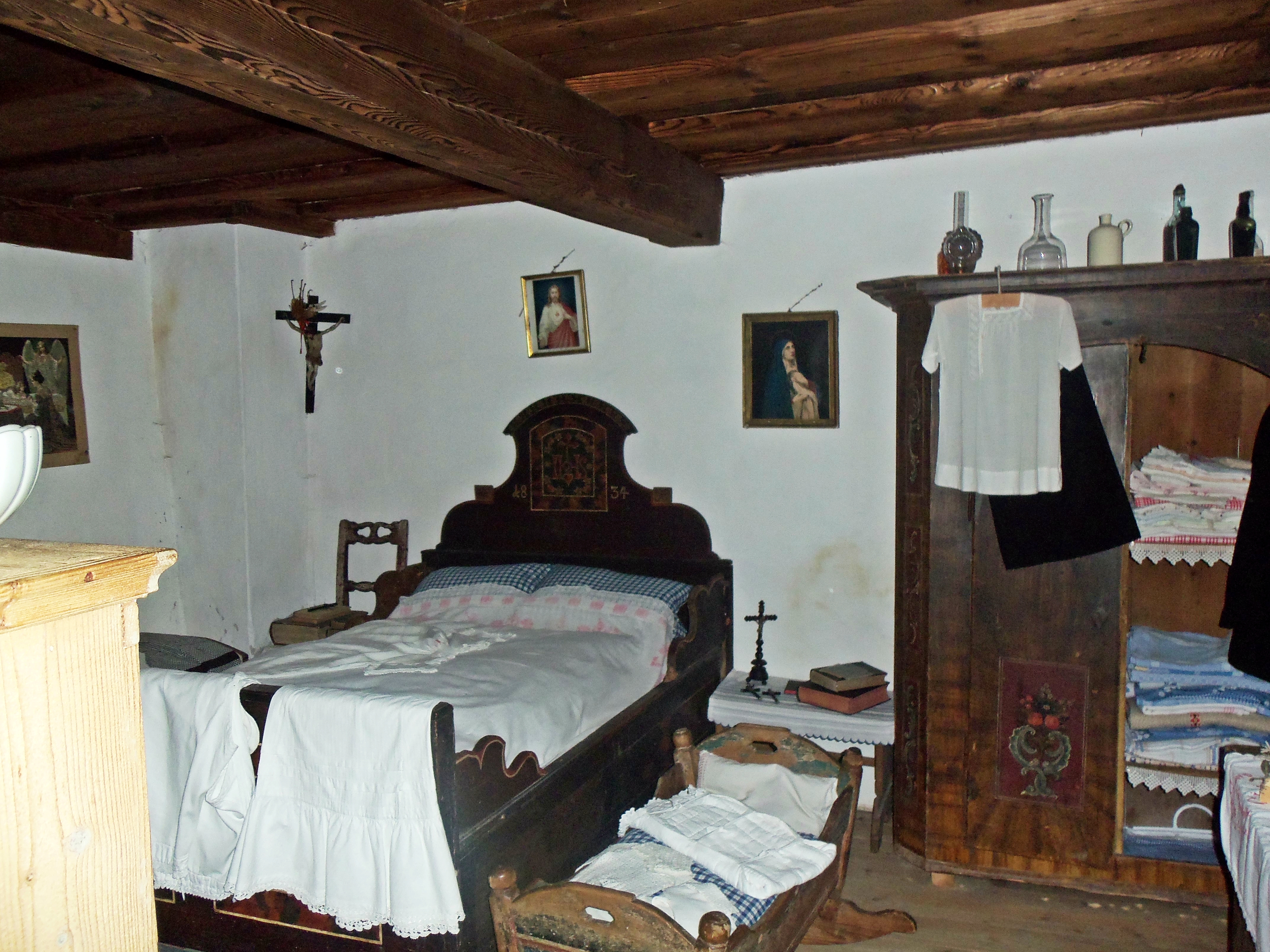 Schlafzimmer Heimathaus